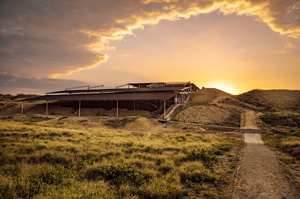 Cabeza de Vaca, importante sitio que ocupó un lugar estratégico en el Qhapaq Ñan. Aquí se recolectaba el spondylus (molusco muy apreciado en el mundo andino) que era traído desde el Golfo de Guayaquil, para luego ser distribuido a todo el Tawantinsuyu